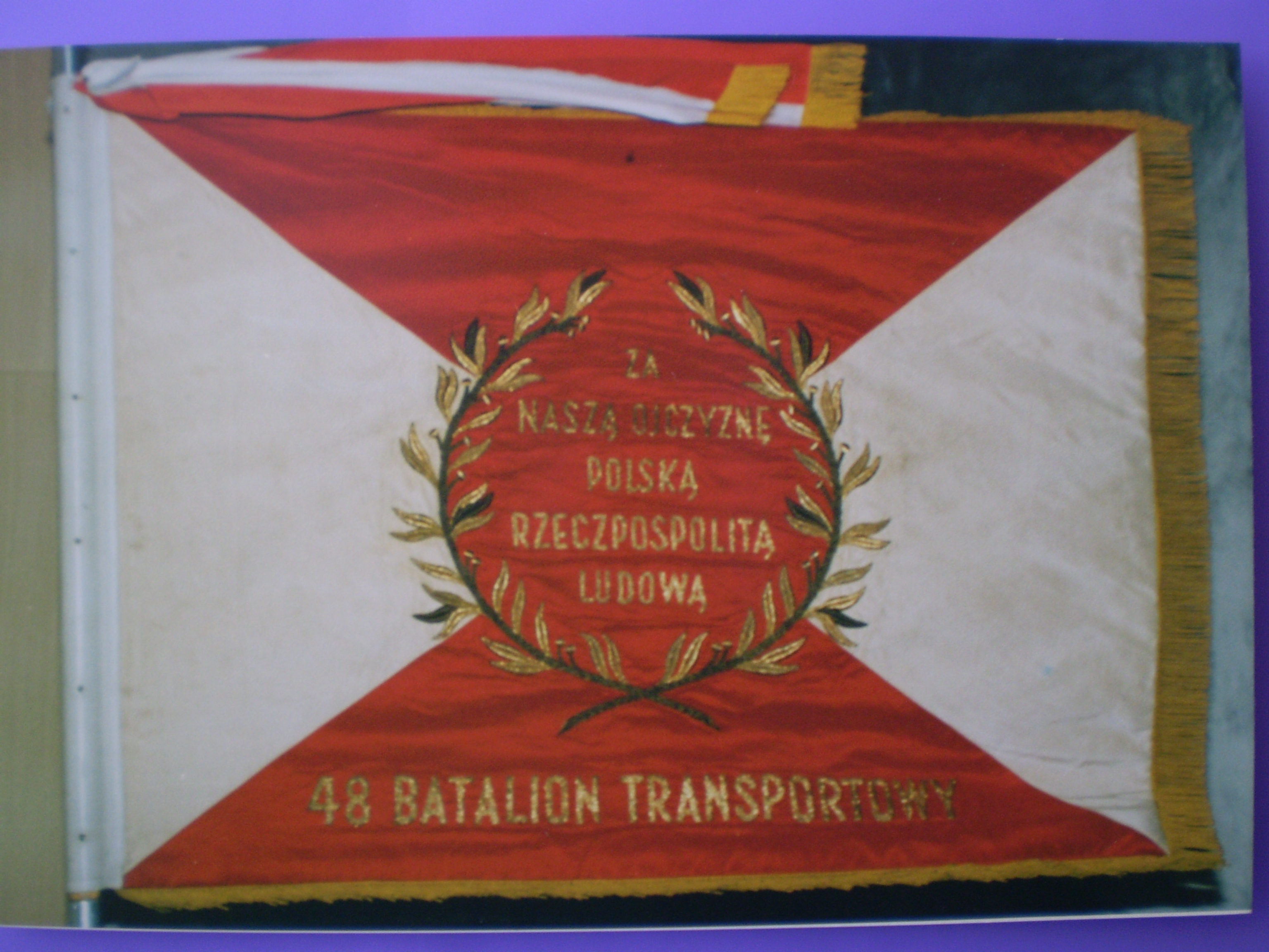 sztandar 48 batalionu transportowego z Gubina